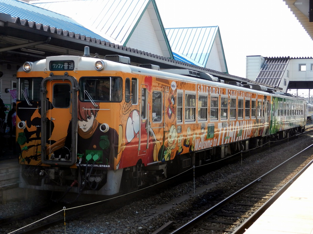 JR東日本 キハ48型気動車 マンガッタンライナー第2編成（キハ48 1535＋キハ48 538）